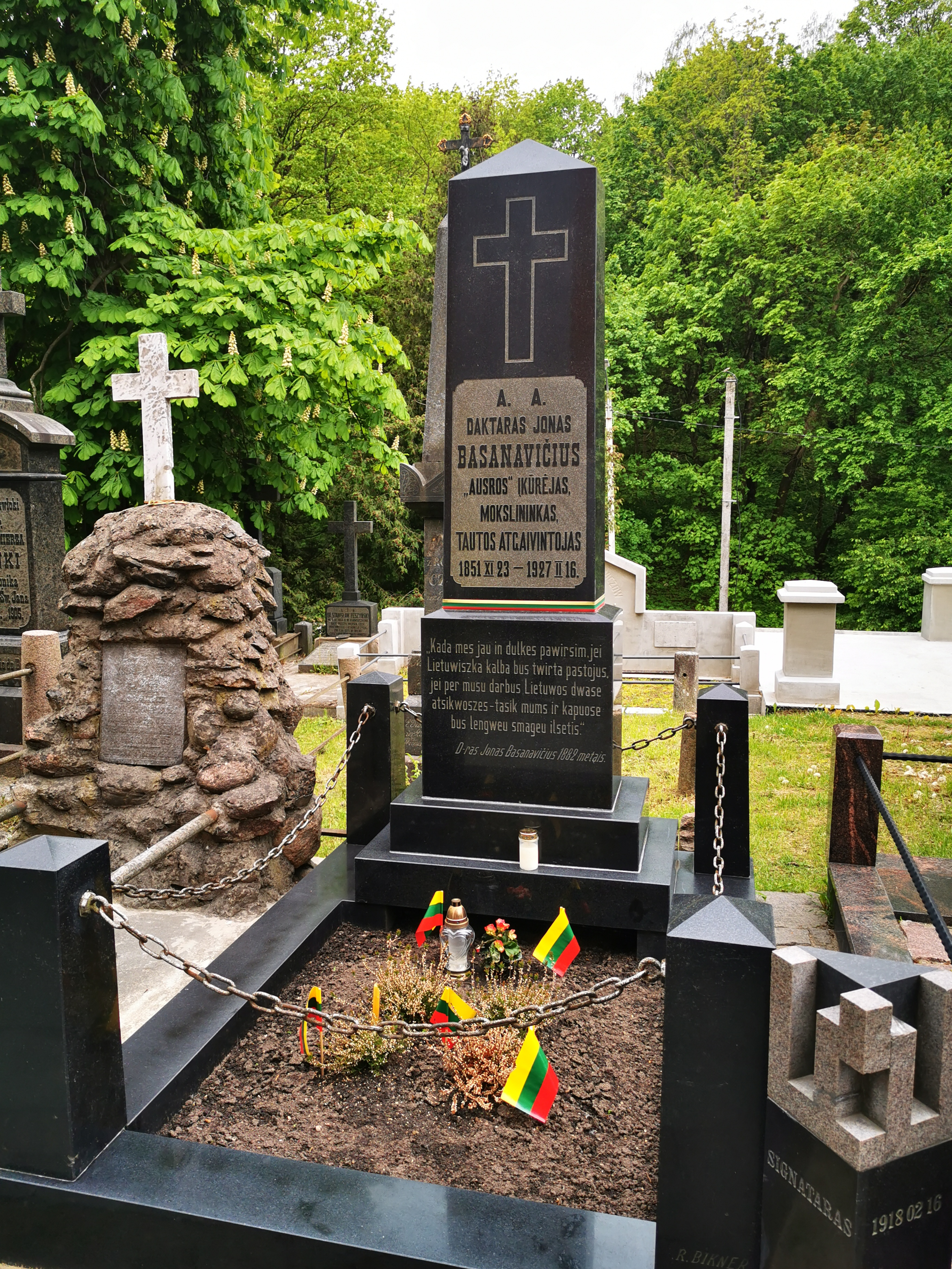 dr. Jono Basanavičiaus antkapis. Jonas Basanavičius (1851 m. lapkričio 23 d., – 1927 m. vasario 16 d., Vilniuje. Palaidotas Rasų kapinėse.) – lietuvių visuomenės veikėjas, pirmasis laikraščio „Aušra“ redaktorius, vienas svarbiausių nepriklausomybės siekėjų, mokslininkas, gydytojas.